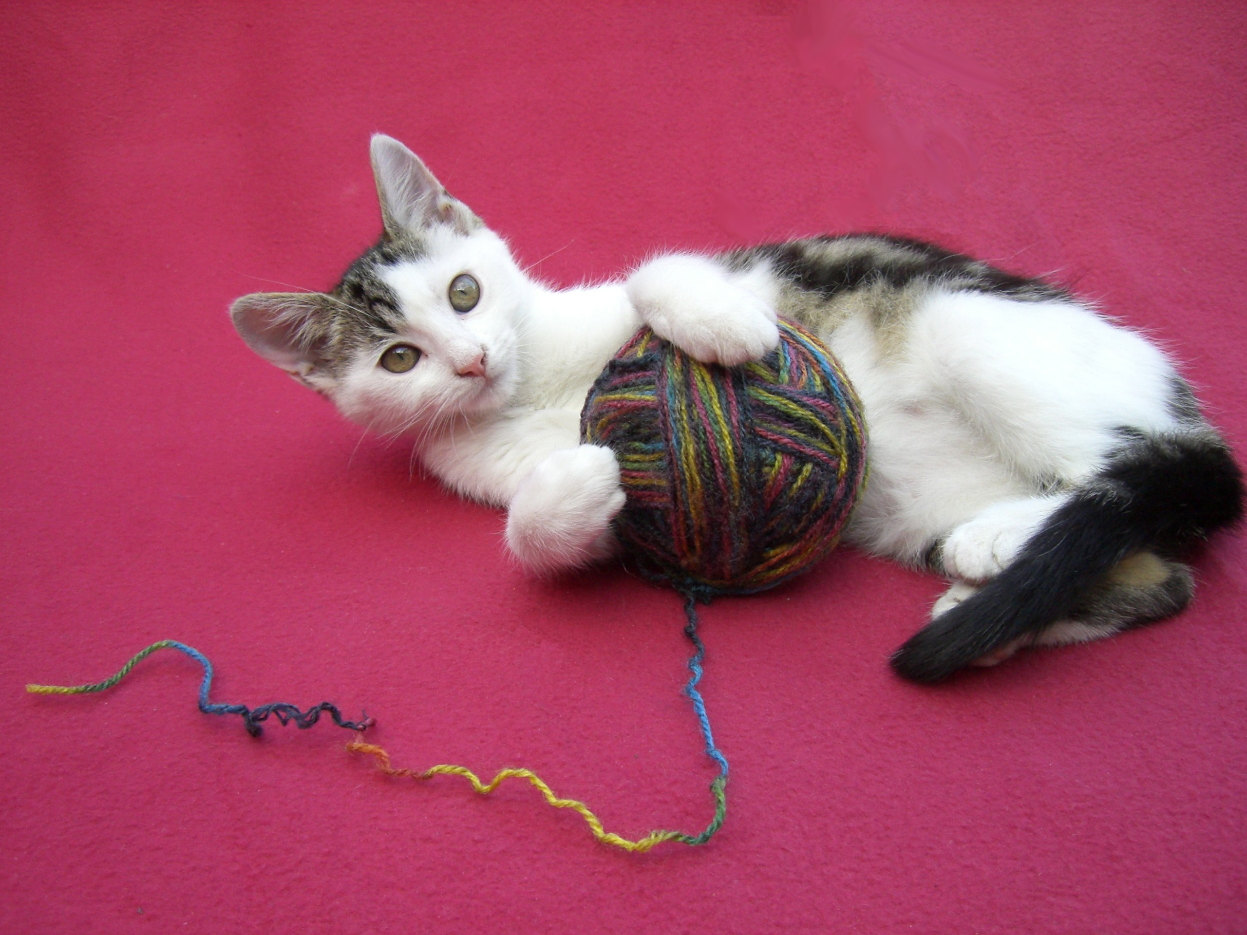 Kätzchen